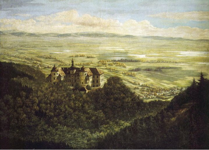 Fotografie zámku Jezeří s Komořanským jezerem v pozadí z roku 1882.